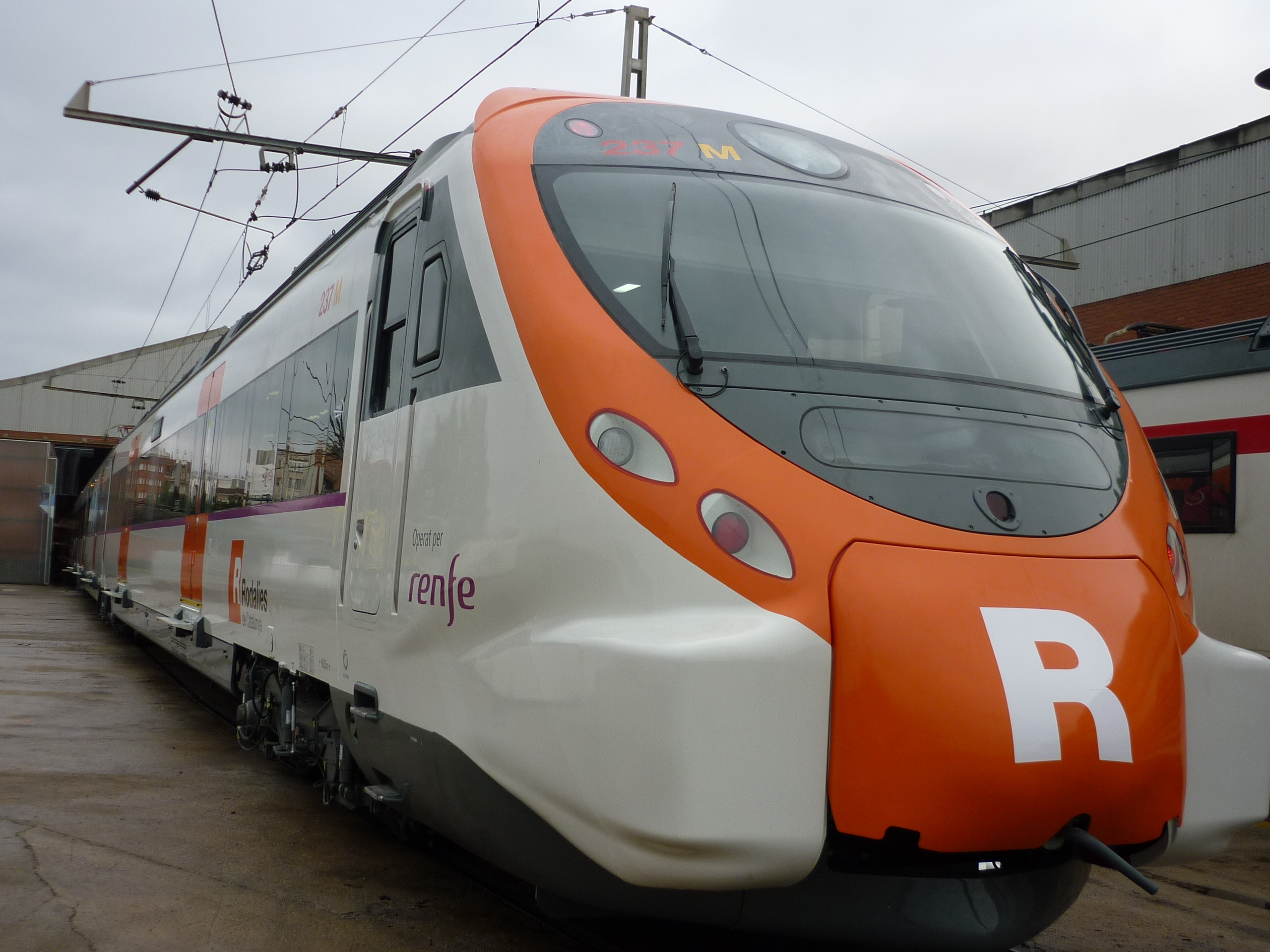 Nou tren de Rodalies Barcelona